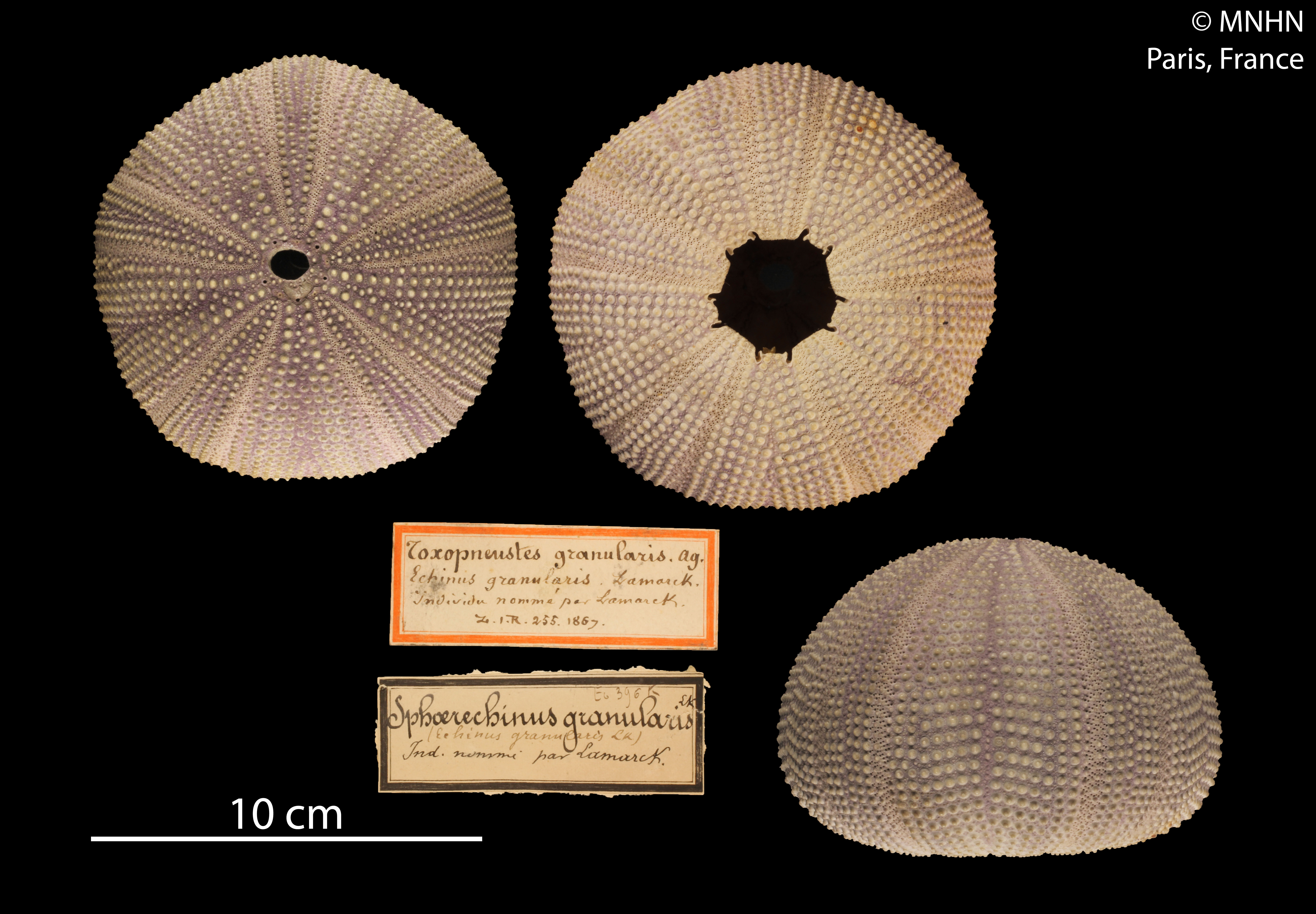 Test de Sphaerechinus granularis, collection du Muséum National d'Histoire Naturelle (Paris, France).